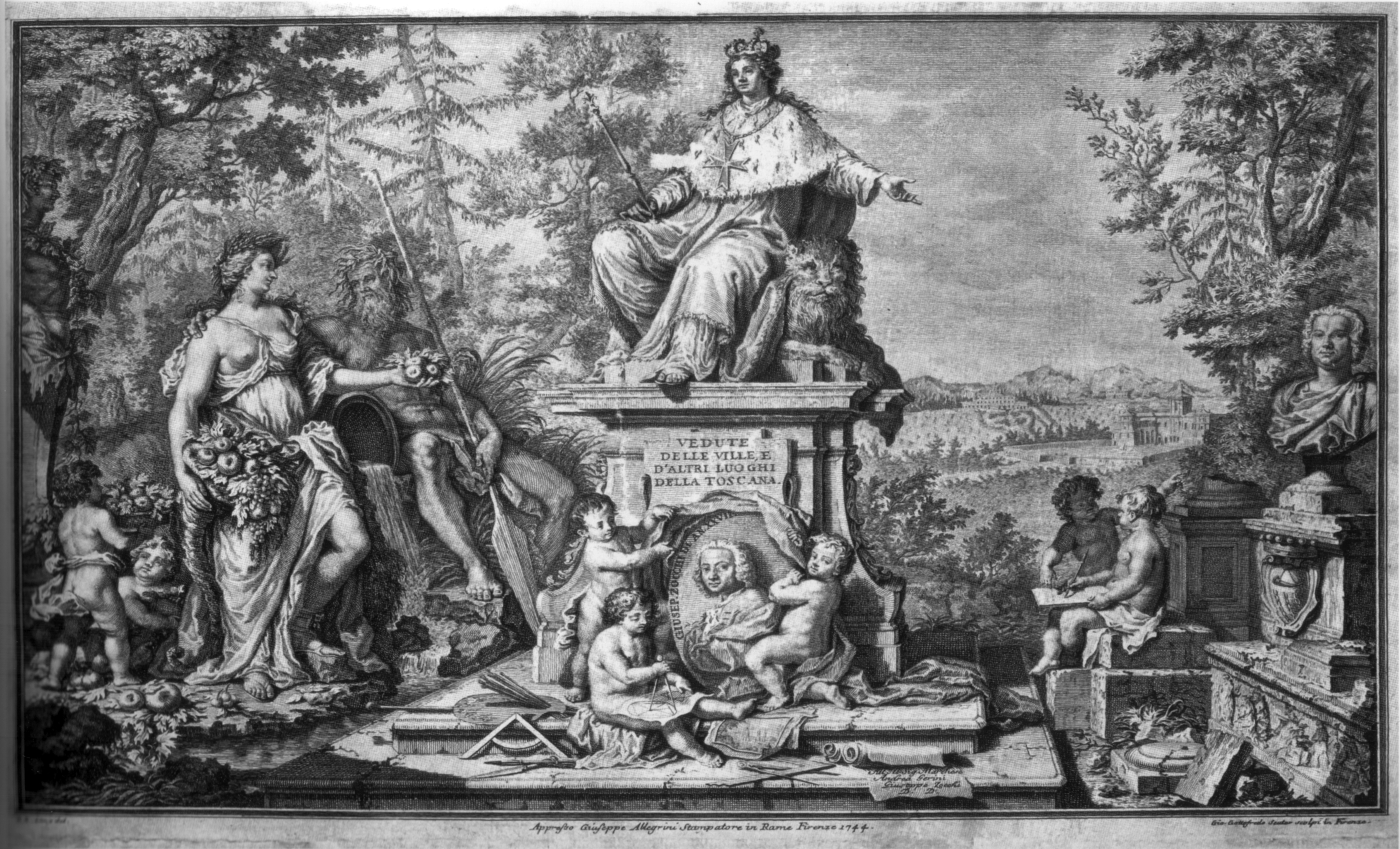 "Il Frontespizio indicante la Toscana ec.", part of Vedute delle ville e d'altri luoghi della Toscana